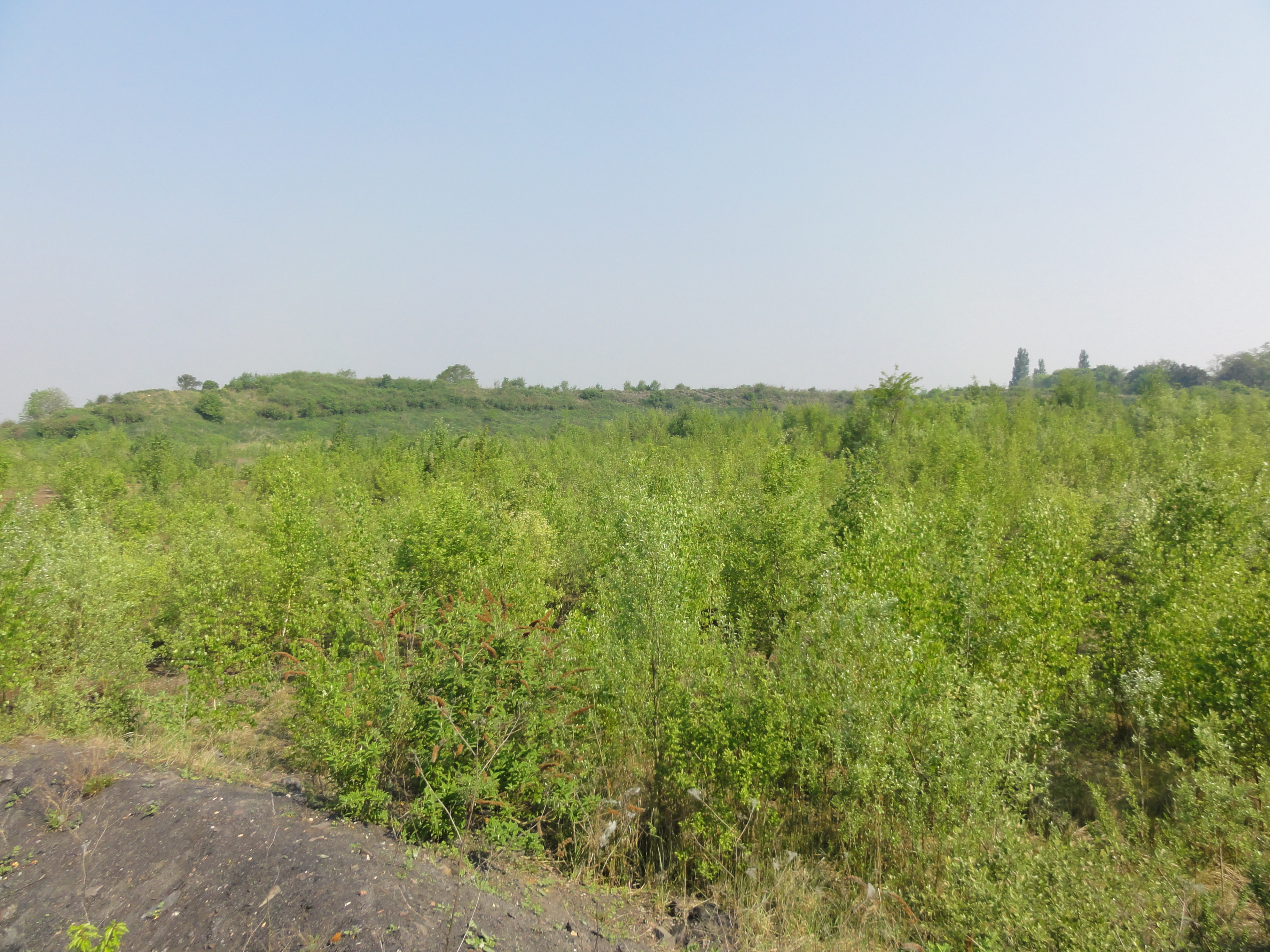 Terril n° 147 dit Casimir Périer Ouest, Fosse Casimir Périer de la Compagnie des mines d'Anzin, Somain, Nord, Nord-Pas-de-Calais, France.